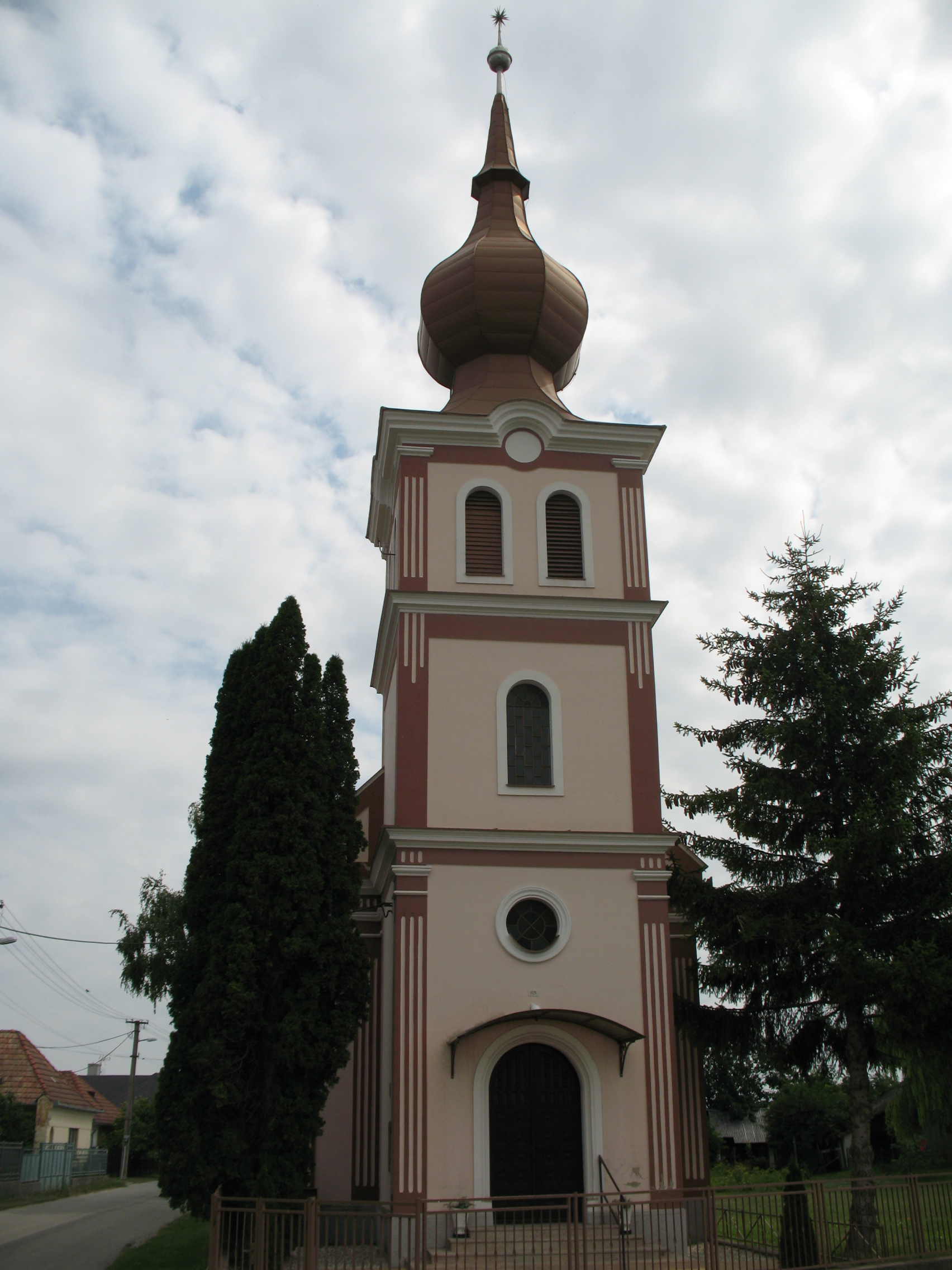 Nagymad